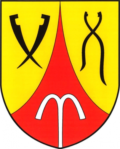 Chotovice (CL), znak. Ve zlatém štítě červený vydutý hrot provázený vpravo zkříženými přivrácenými postavenými kosami bez kosišť, vlevo sklářskými kleštěmi, vše černé. V hrotu stříbrný tryskající pramen.